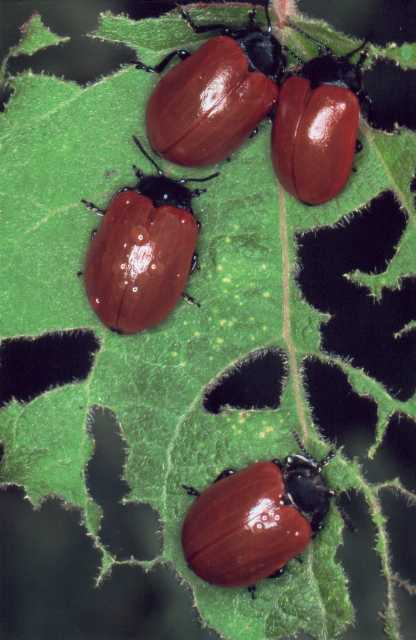 Description: Melasoma ou Chrysomela populi, août 2003, Saône et Loire Source: Jean-Jacques MILAN Licence: GFDL Jean-Jacques MILAN